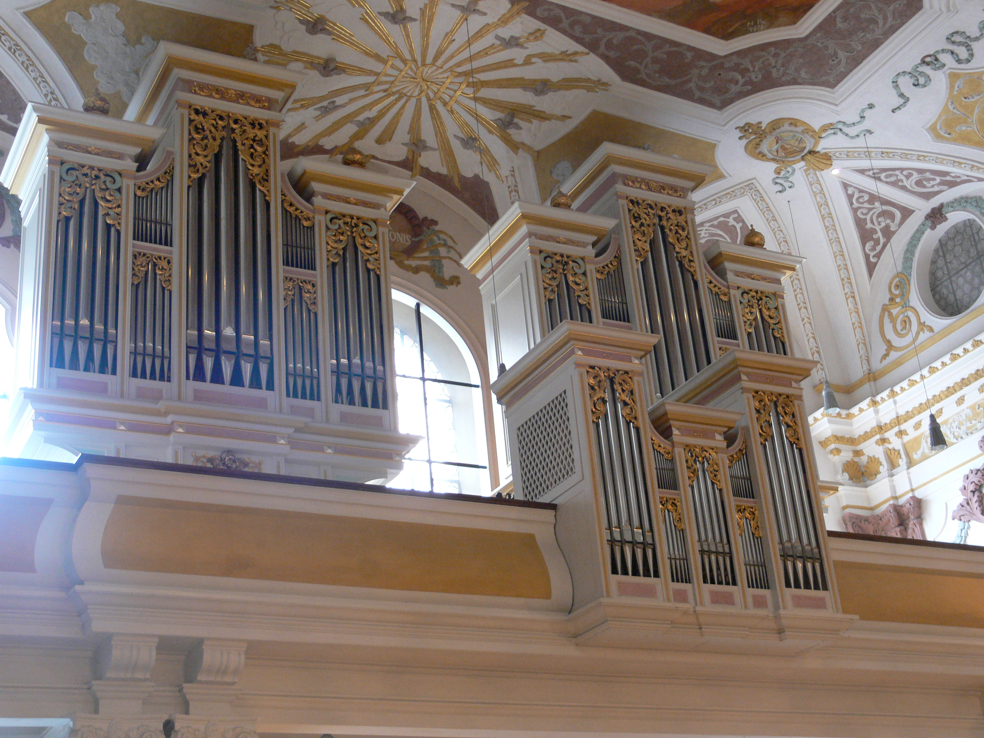 Bürgersaalkirche, München, Orgel